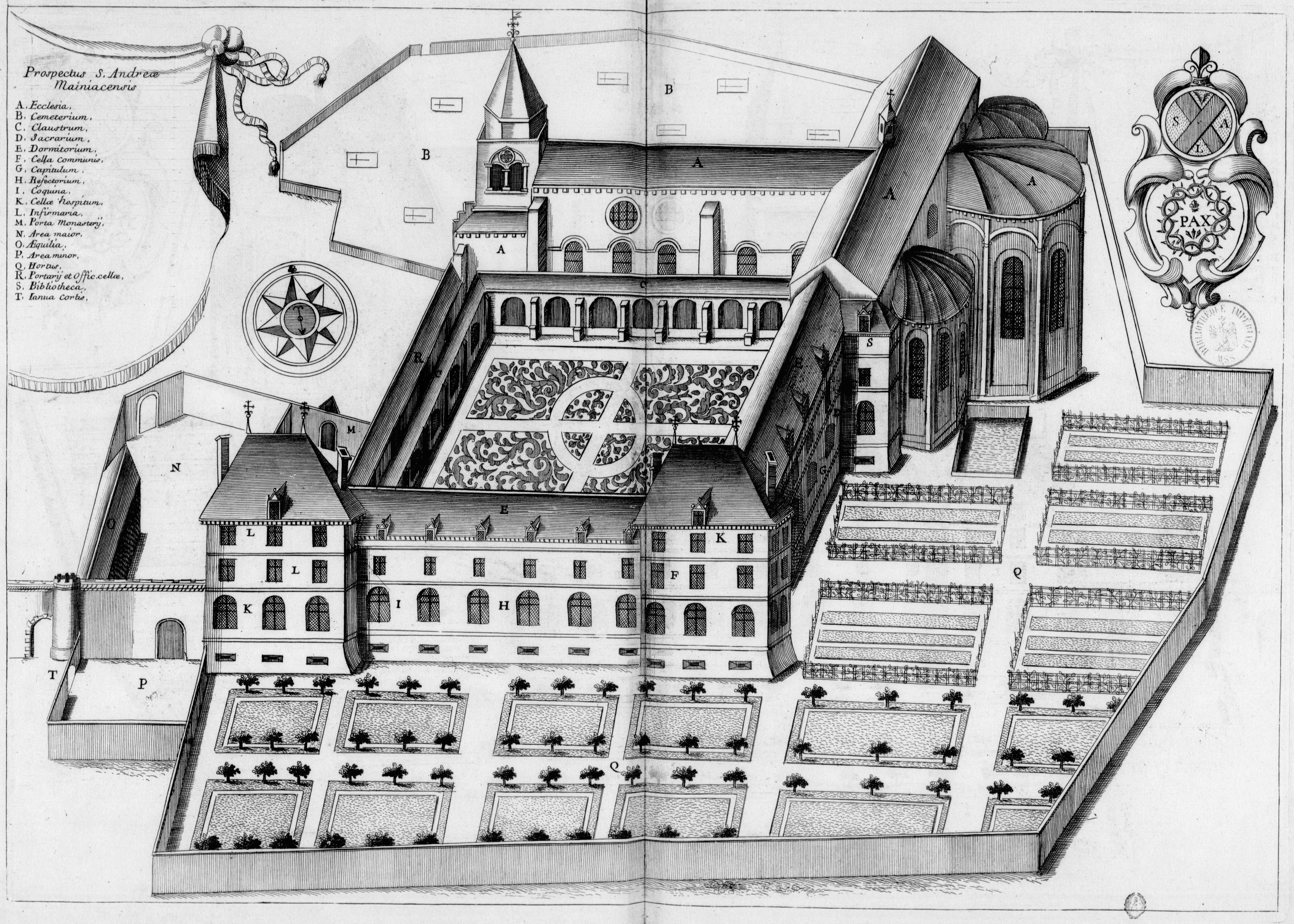 Planche gravée du 17ème siècle représentant l'abbaye Saint-André de Meymac, en France, dans le livre Monasticon Gallicanum.